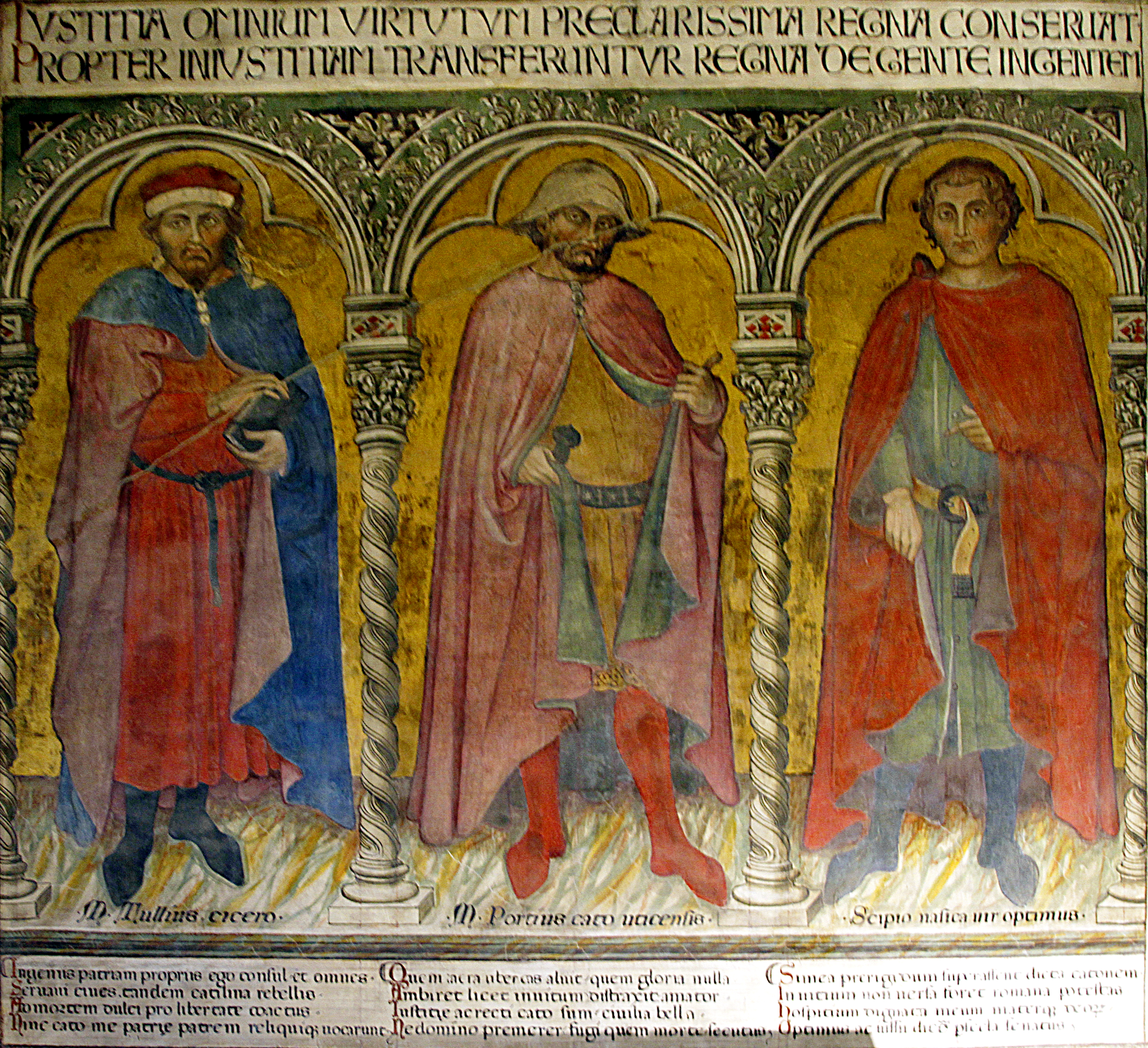 Cicero, Marcus Porcius Cato der Jüngere und Publius Cornelius Scipio Nasica. Wandgemälde des frühen 15. Jahrhunderts von Taddeo di Bartolo im Palazzo Pubblico, Siena.